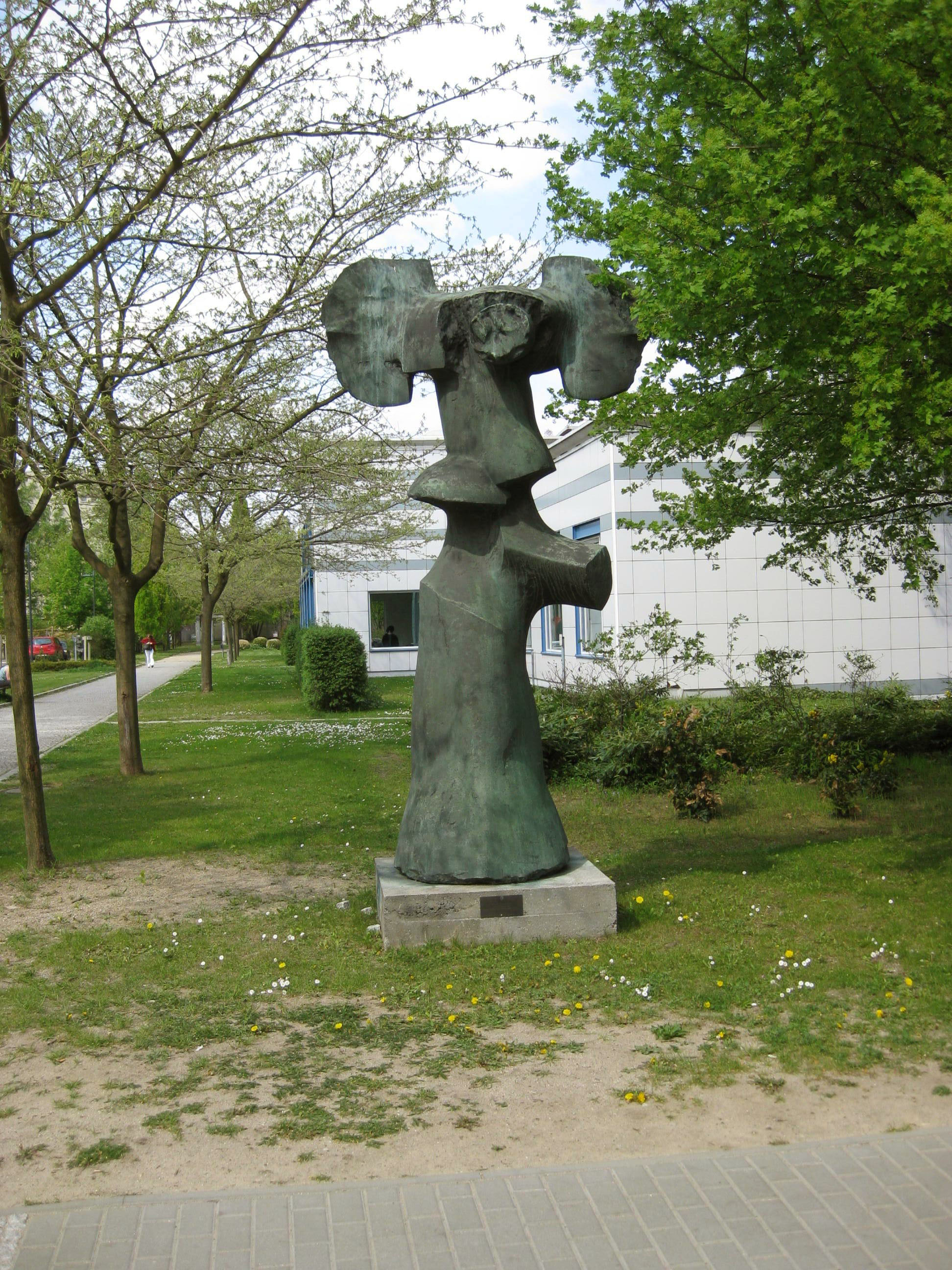 Emanuel Scharfenberg, Elefantenbaum, 1981, - Skulpturengarten AVK, Rubensstr. 125, Berlin (Schöneberg)